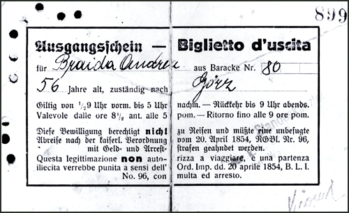 Ausgangsschein Wagna